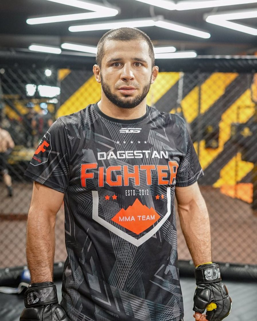 Фото Рустама Керимова